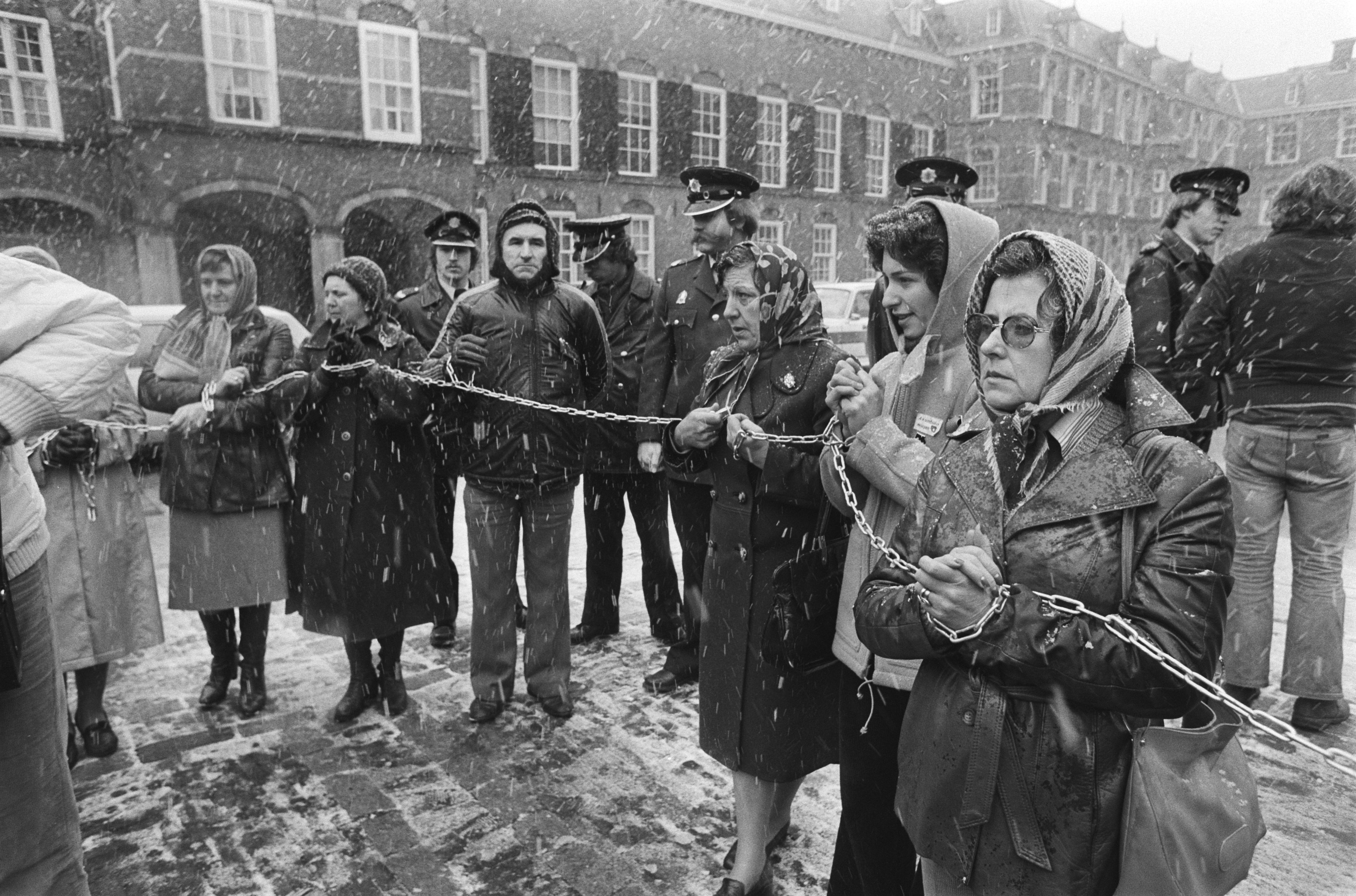 Collectie / Archief : Fotocollectie Anefo Reportage / Serie : Demonstratie van "geketende" vrouwen op het Binnenhof tegen het gevangen zetten en houden van Baskische jongeren in Spanje Datum : 15 maart 1979 Locatie : Den Haag, Zuid-Holland Trefwoorden : demonstraties, vrouwen Fotograaf : Suyk, Koen / Anefo Auteursrechthebbende : Nationaal Archief Materiaalsoort : Negatief (zwart/wit) Nummer archiefinventaris : bekijk toegang 2.24.01.05 Bestanddeelnummer : 930-1694